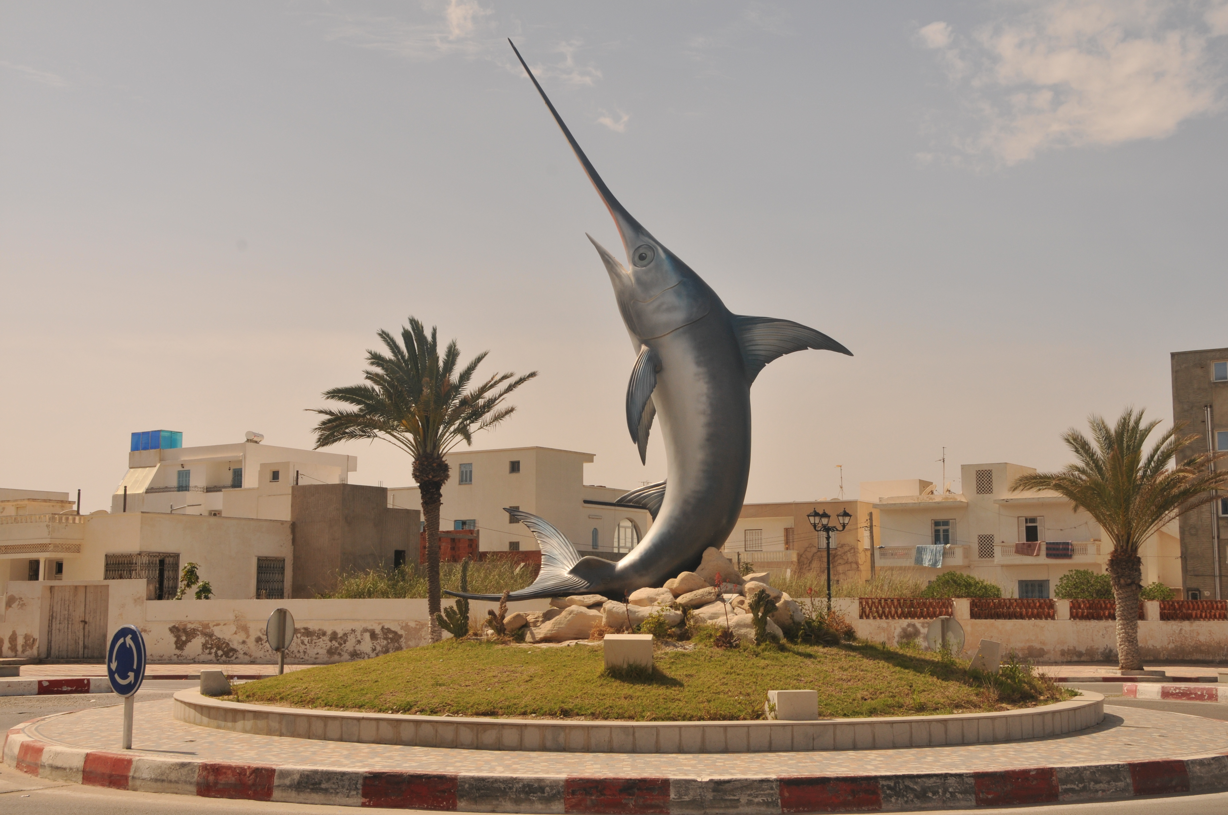 Carrefour sur la route de la zone touristique à Mahdia